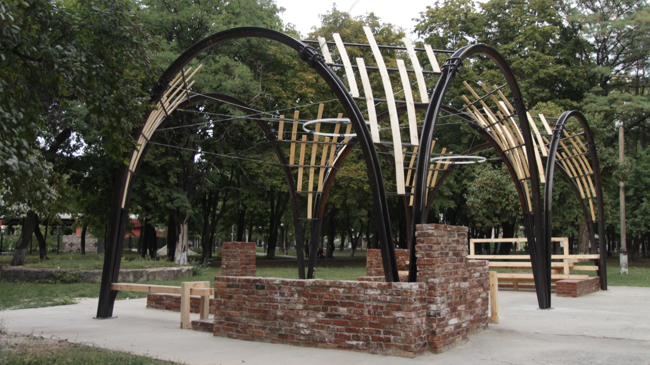 Відкритий громадській просітр "Залізняк" м.Покровськ, 2017р.